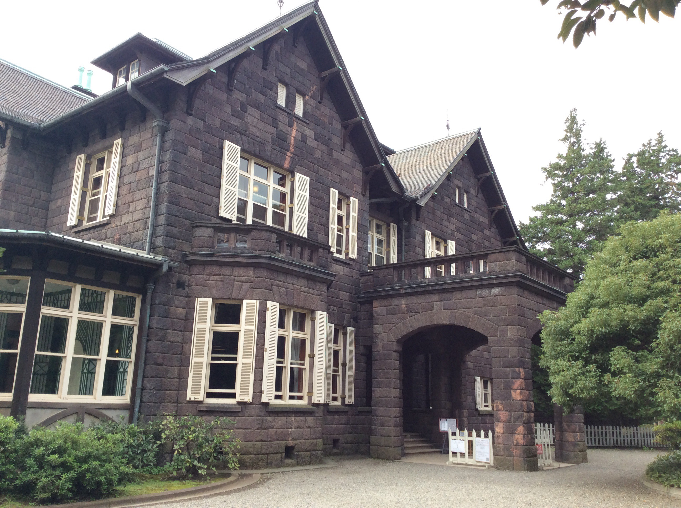 旧古河邸、正面。